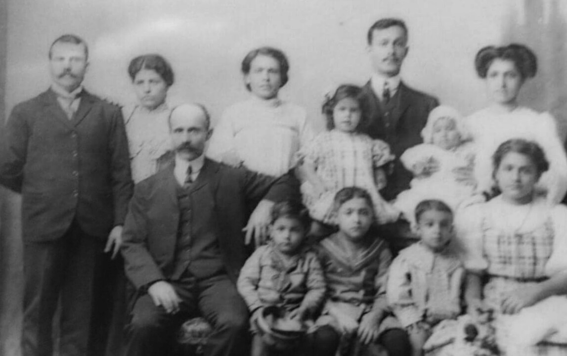 Familia libanesa en Costa Rica.